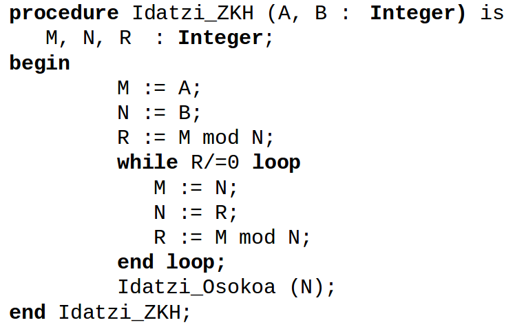 Bi zenbaki osoren zatitzaile komunetako handiena kalkulatzeko programa Ada lengoaian